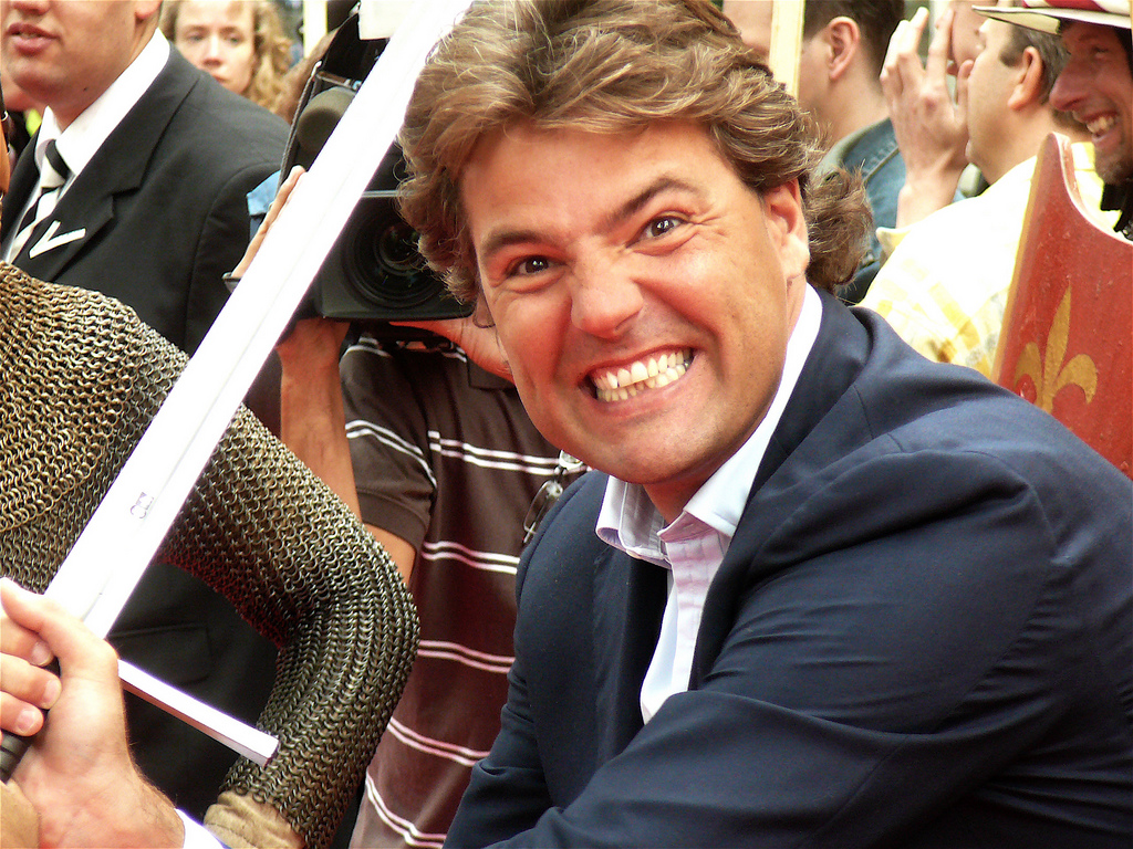 Reinout Oerlemans. Zondag13 juli 2008 première bij Pathé Buitenhof in Den Haag. De Brief voor de Koning, de verfilming van het boek van" Tonke Dragt ".,Cast en crew waren aanwezig bij de speciale vertoning. Archeon verzorgd de Middeleeuwse sfeer bij de premiere met Ridders en Jonkvrouwen. Reinout Oerlemans (producent, gastheer) pakte een zwaard en kwam op de groep fotografen af